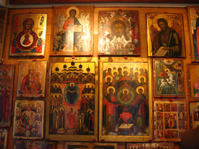 Ветка. Веткаўскі музей